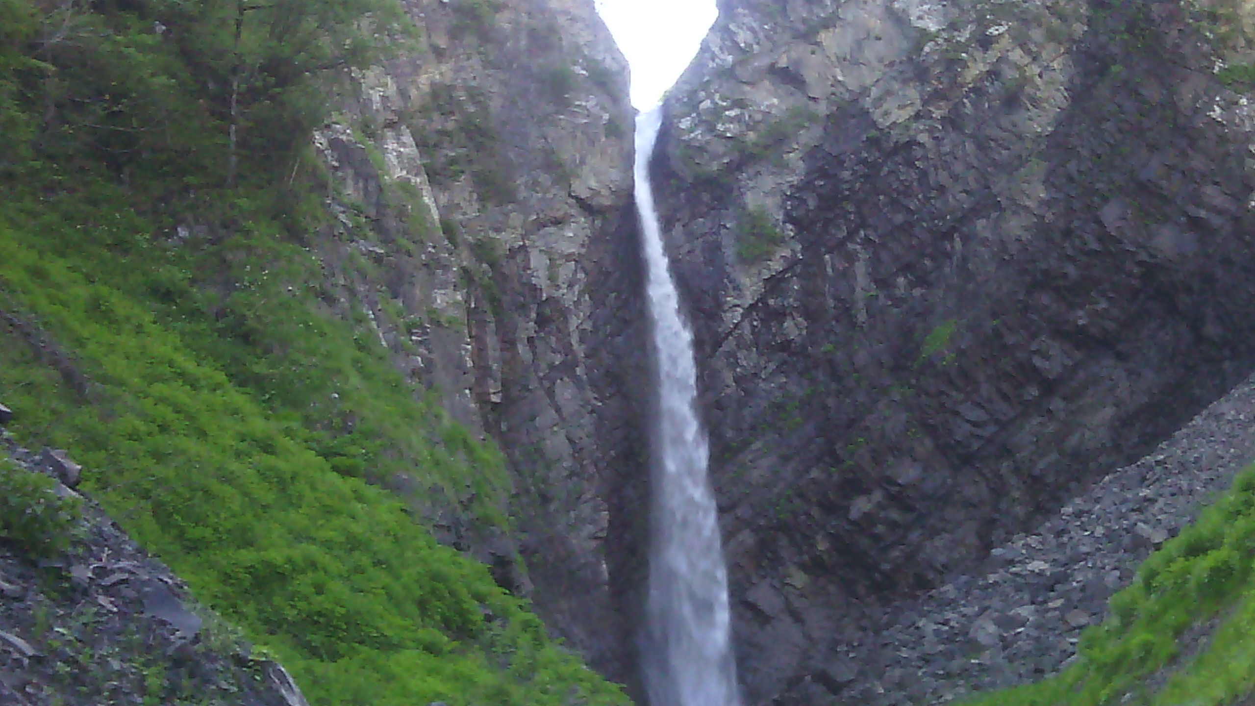 Qoçyataq şəlaləsi